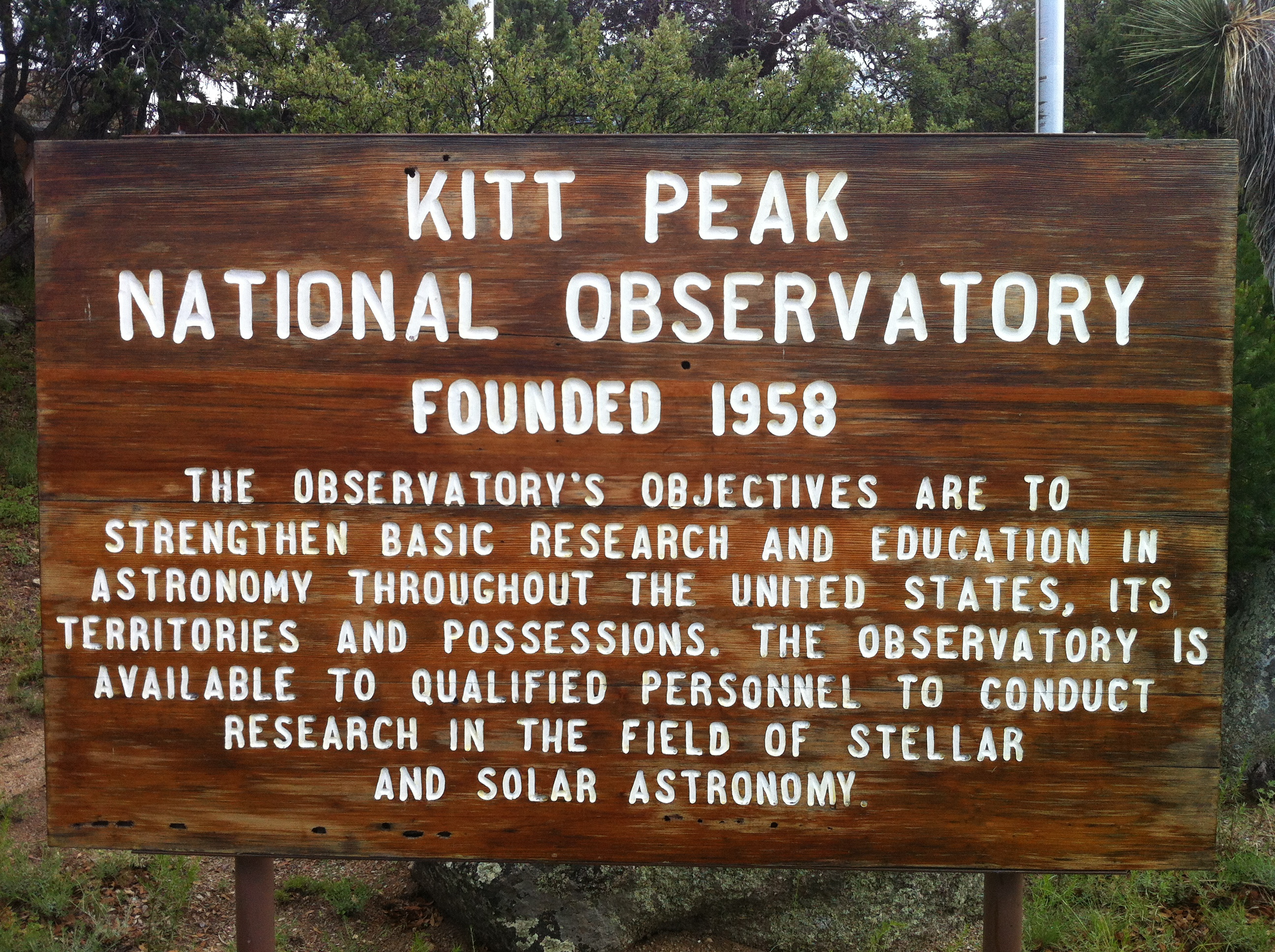 Sign